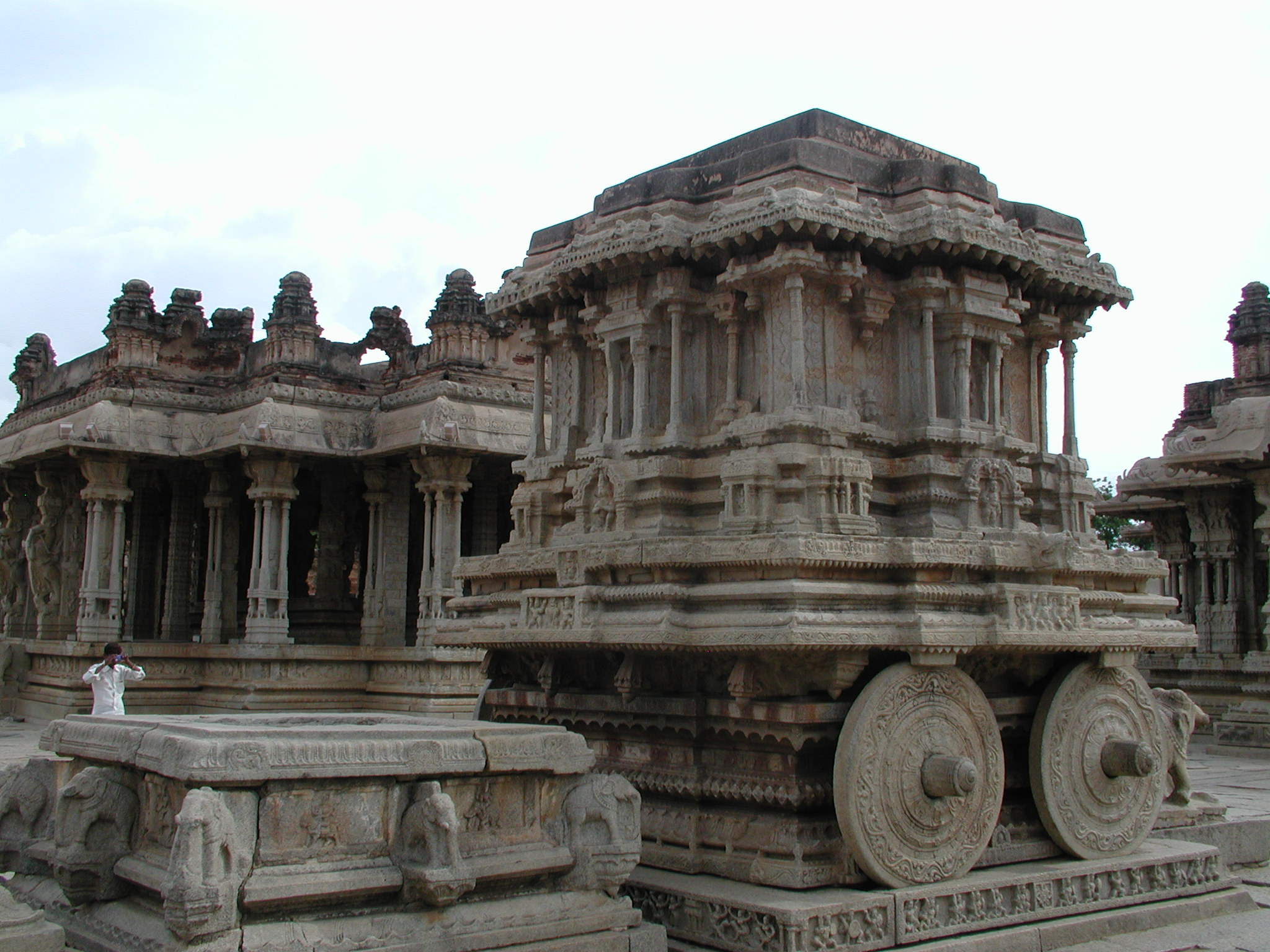 Vittala temple near Hampi, Karnataka, India